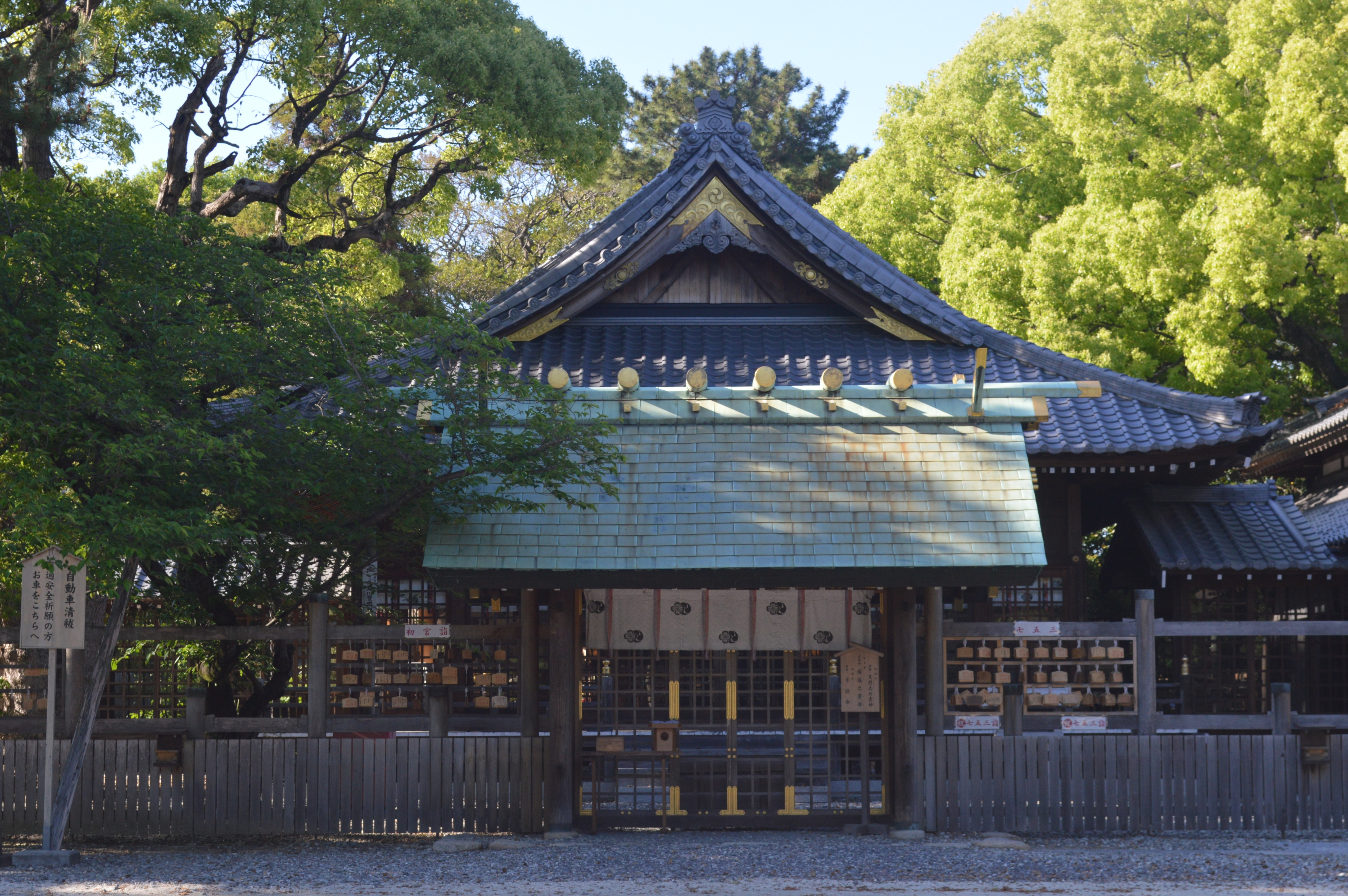 愛知県知多郡武豊町字上ケ8にある武雄神社。